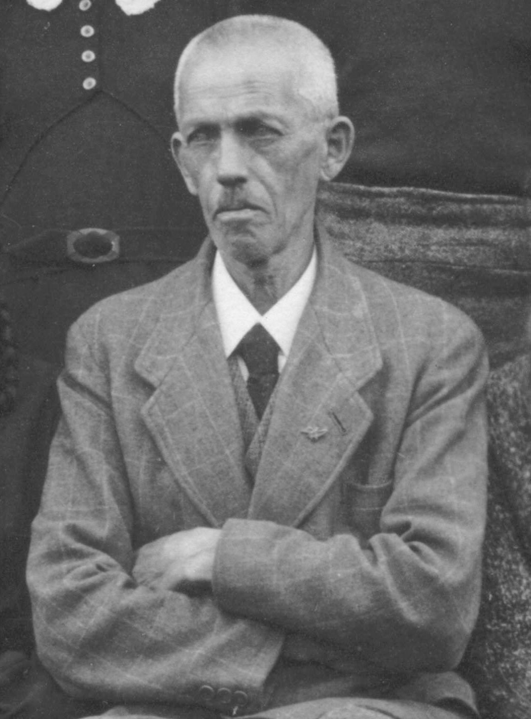 aus einer Fotosammlung, die bei der Erforschung des Lebens und Werks von August Högn (1878 - 1961) entstand.